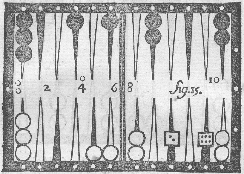 Figure du jeu de trictrac (positions des jetons)